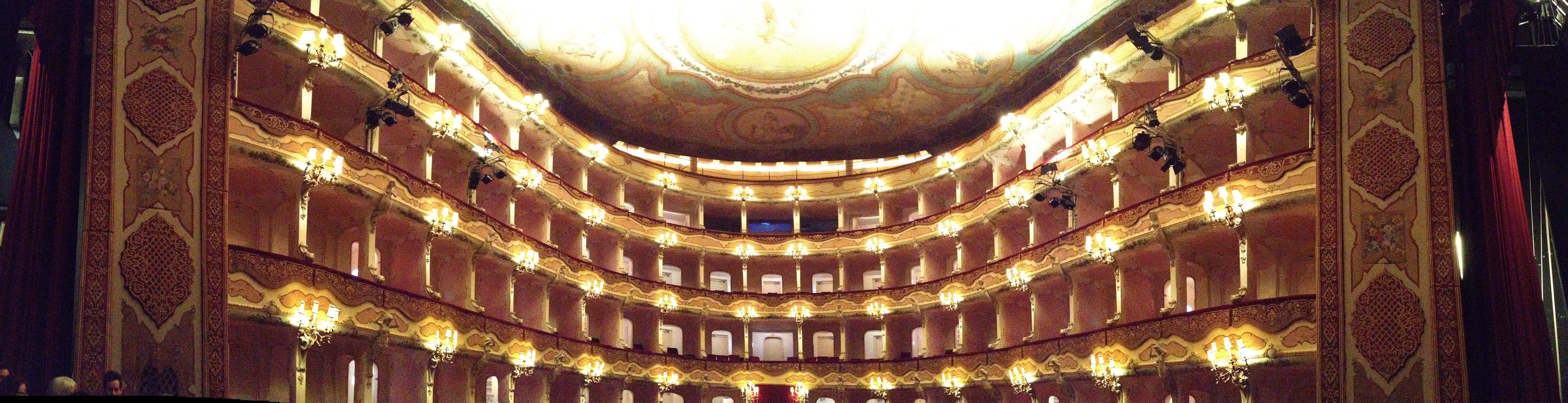 Teatro Comunale "Mario Del Monaco" di Treviso - Sala teatrale.